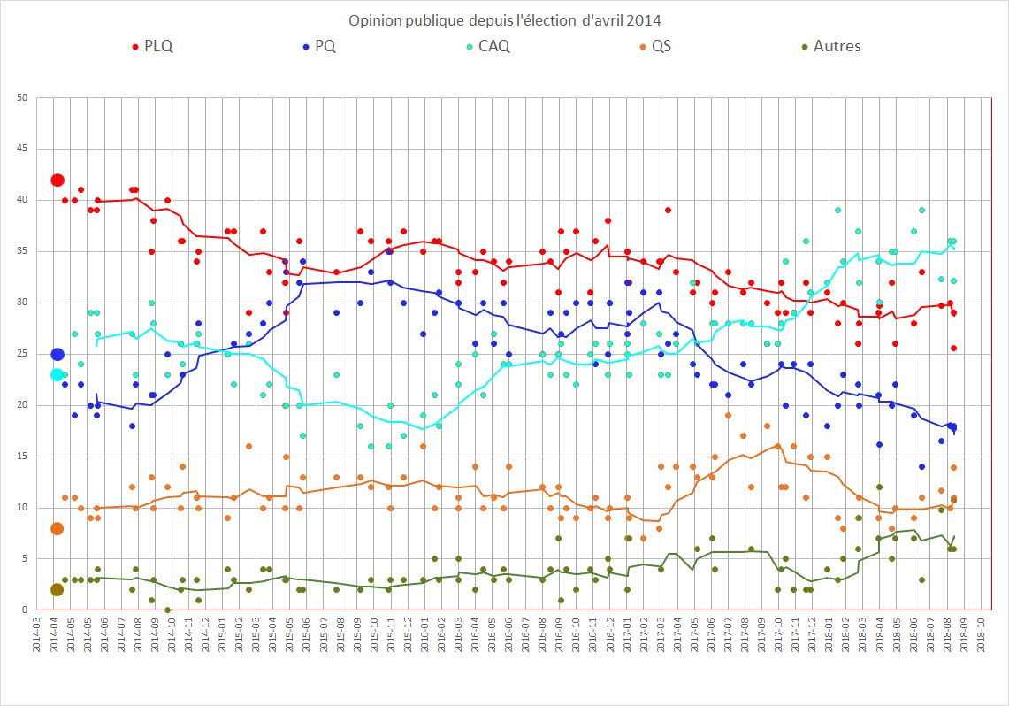 Évolution des intentions de vote finale entre la 41e élection et le déclenchement de la 42e.